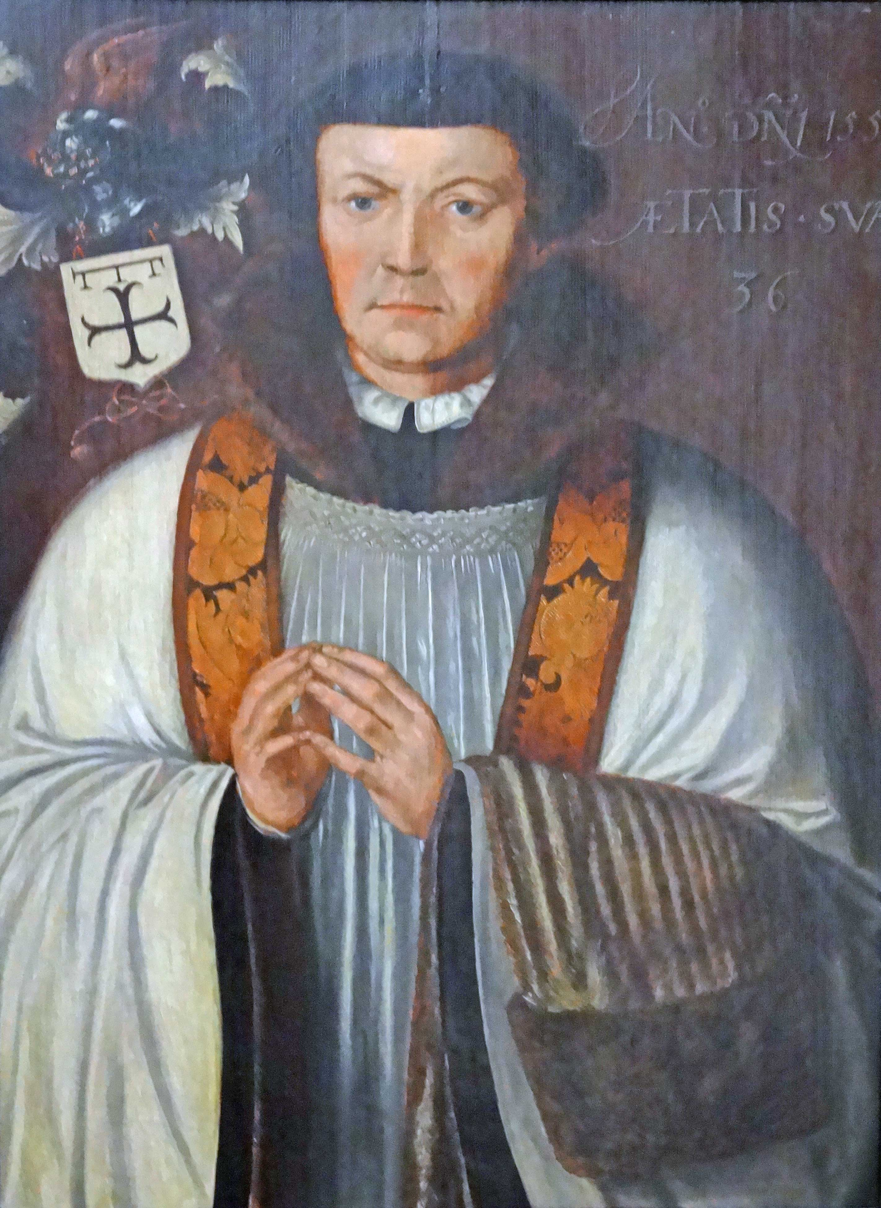 Portret van Johannes 't Sanctius (1517/18-1554), geschilderd paneeltitle QS:P1476,nl:"Portret van Johannes 't Sanctius (1517/18-1554), geschilderd paneel" label QS:Lnl,"Portret van Johannes 't Sanctius (1517/18-1554), geschilderd paneel"